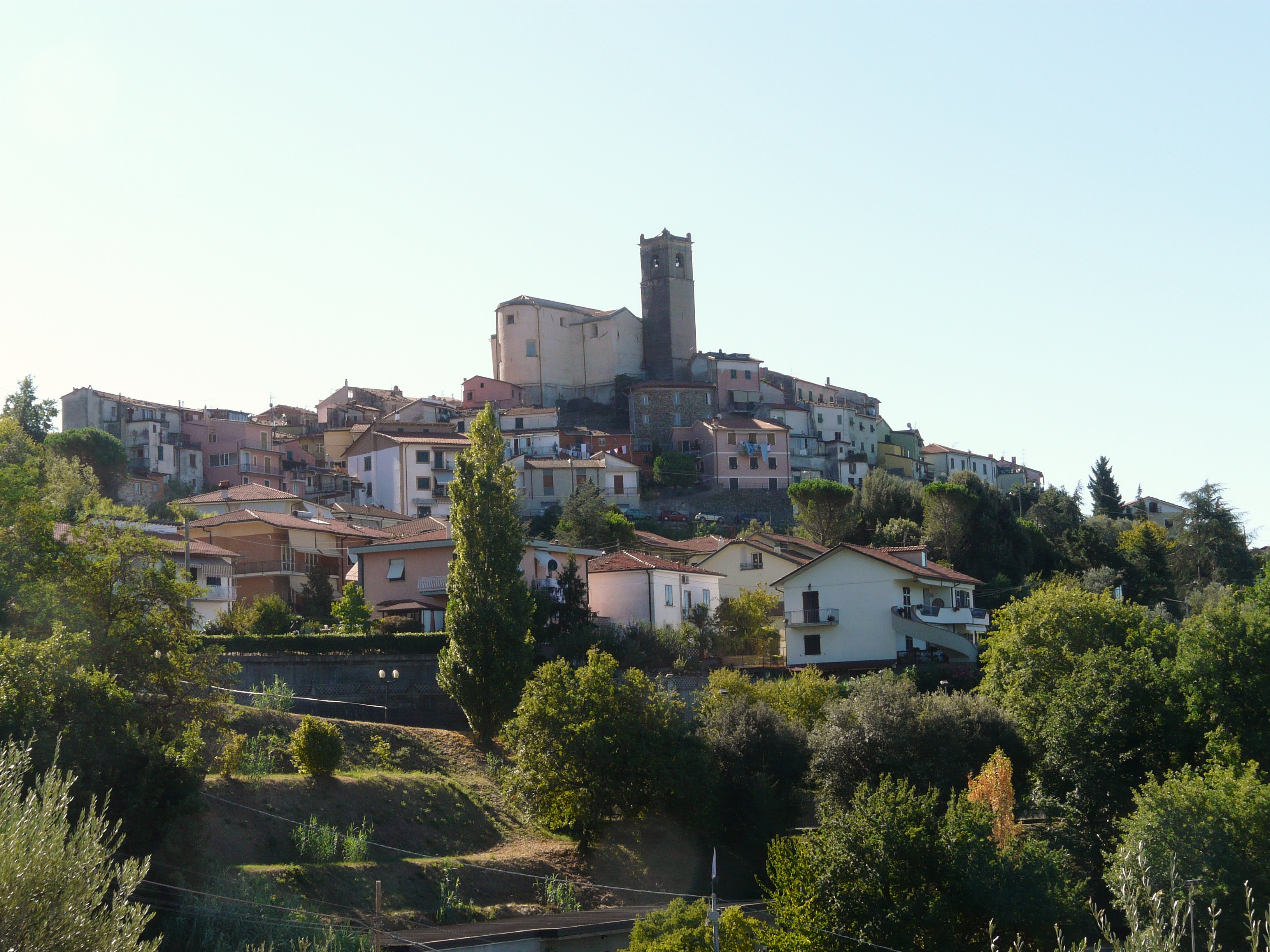 Ponzano Superiore, Santo Stefano di Magra, Liguria, Italia